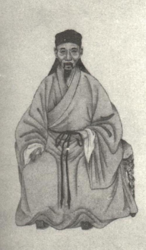 吕留良，清朝学者。Lv Liuliang